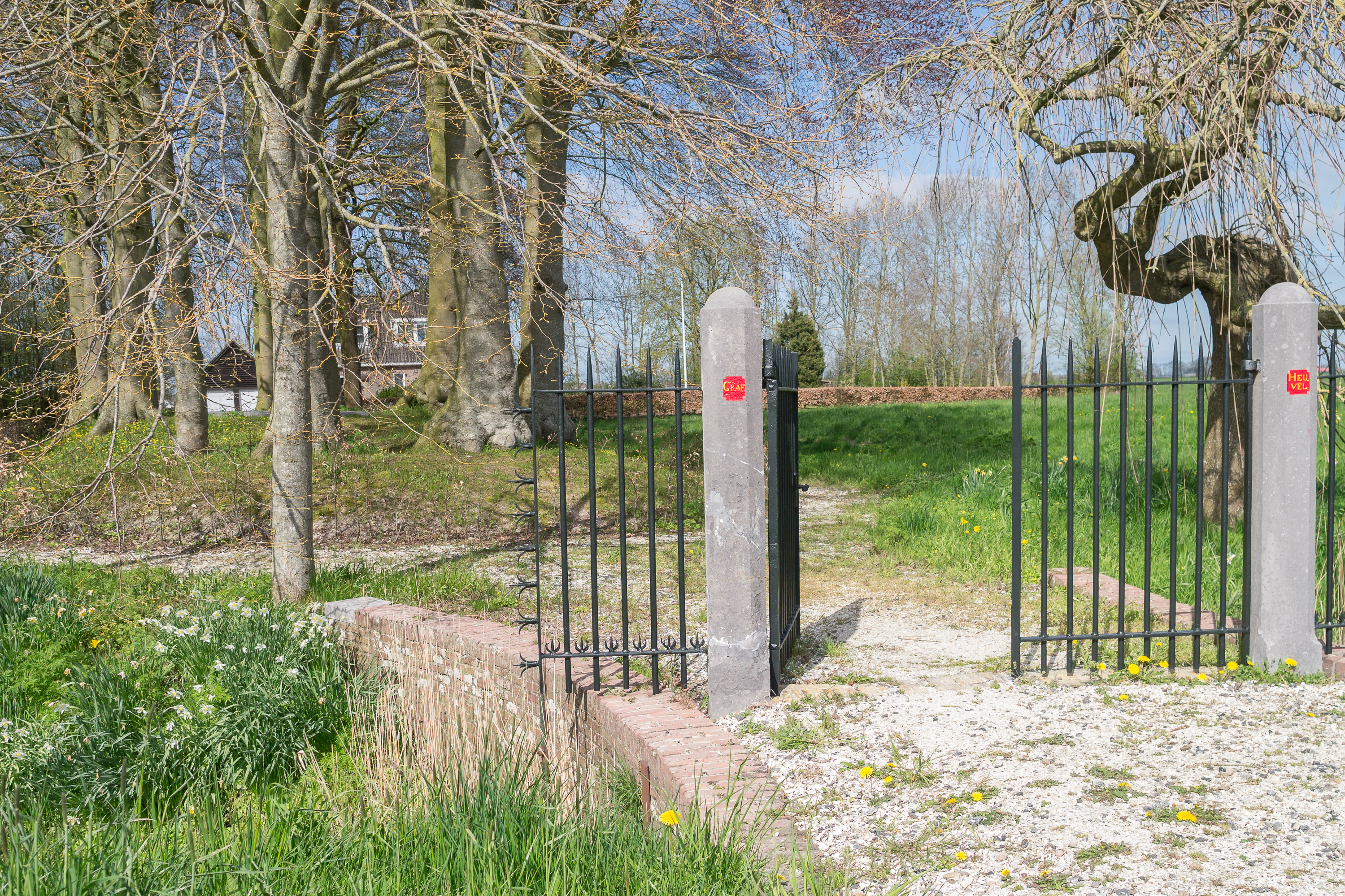 heuvel met familiegraven Martenastate